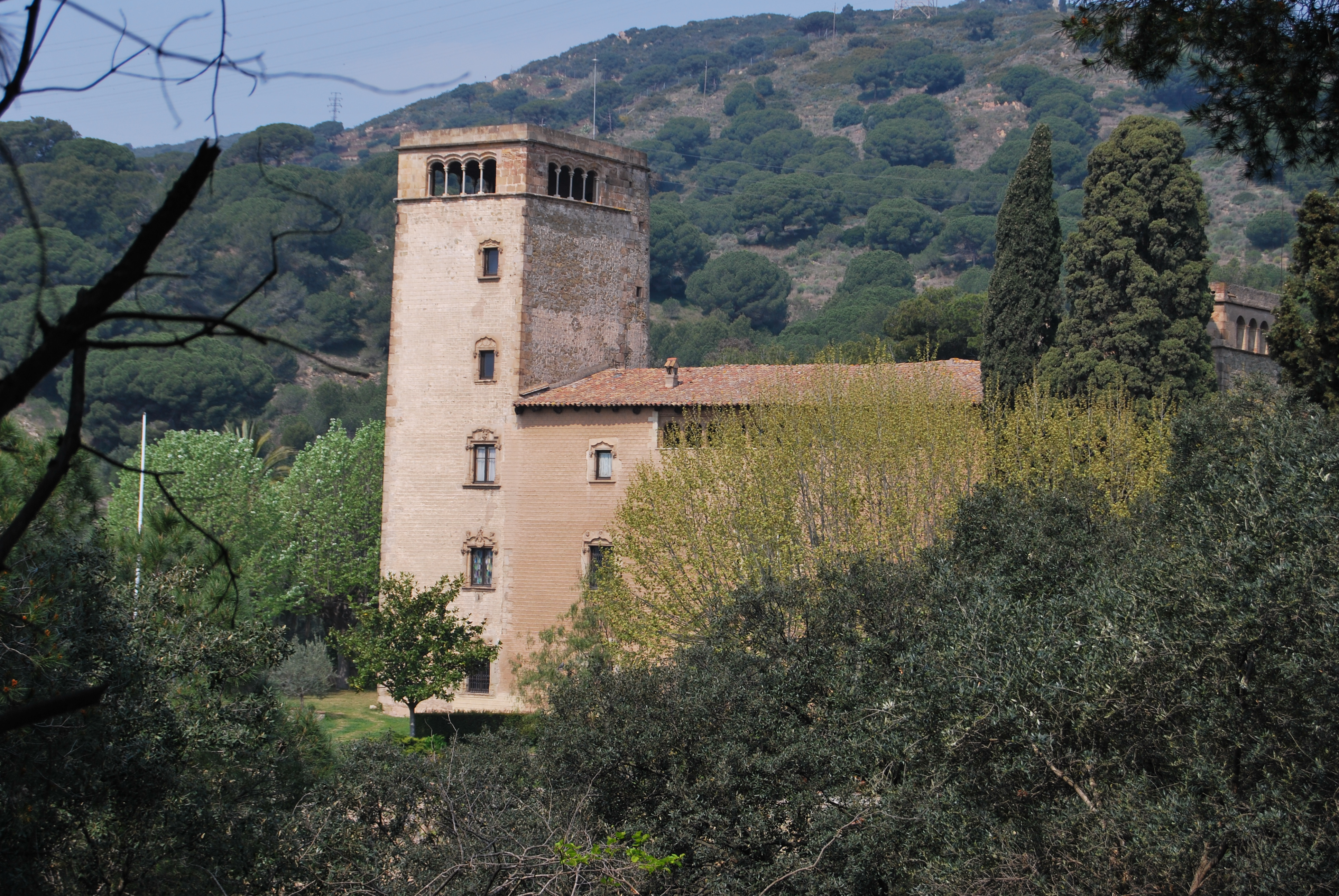 Torre Pallaresa, a Santa Coloma de Gramenet, gótic civil català.